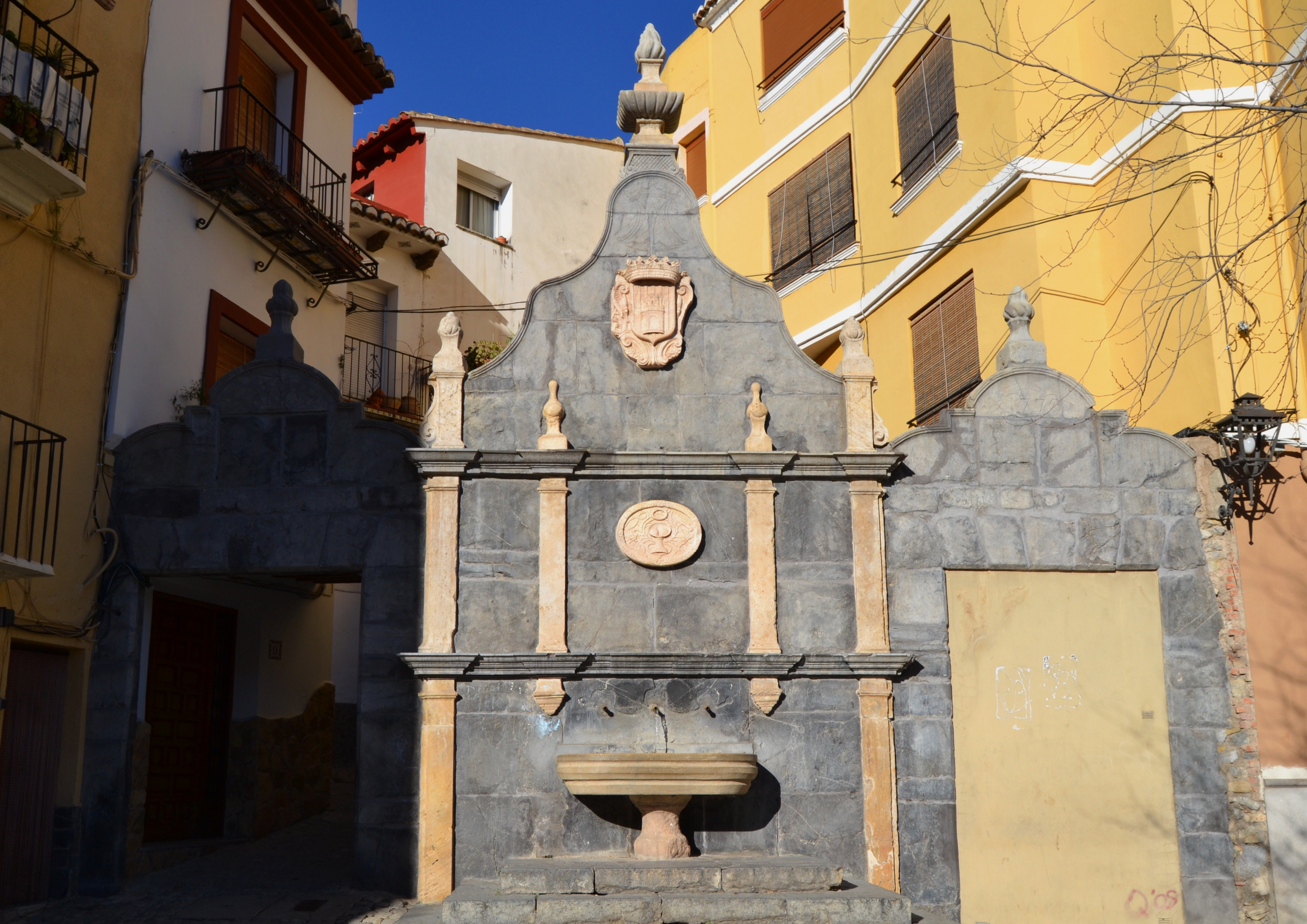 Font de santa Àgueda de Xèrica.